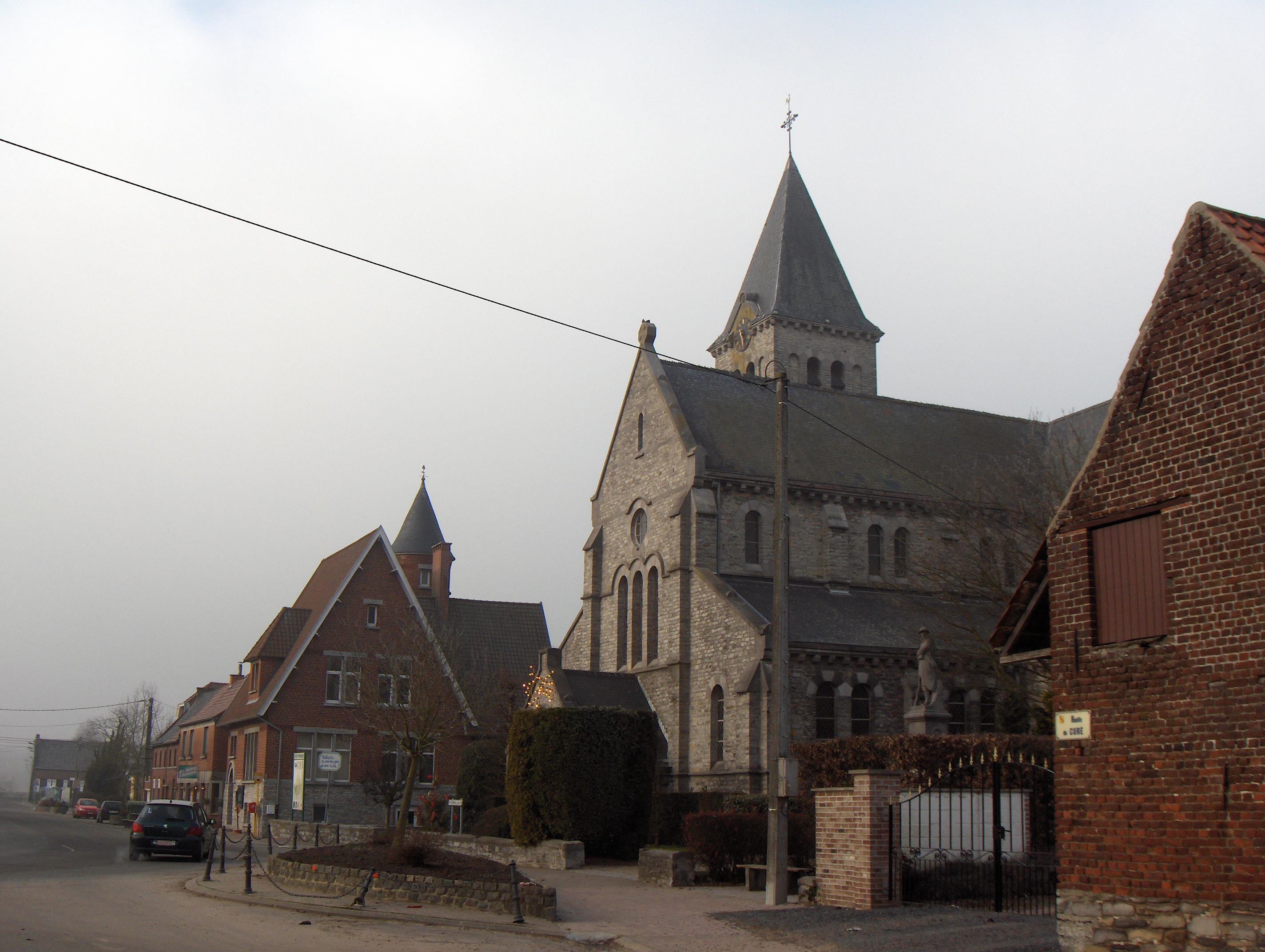 Lesdain, Ortsteil der Gemeinde Brunehaut (Belgien, Prov. Hennegau), Dorfmitte mit St. Eleutheriuskirche (église saint-éleuthère)